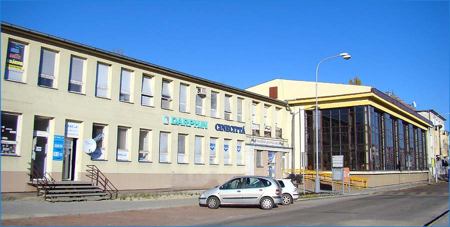 Relax komplex, Nové Zámky.